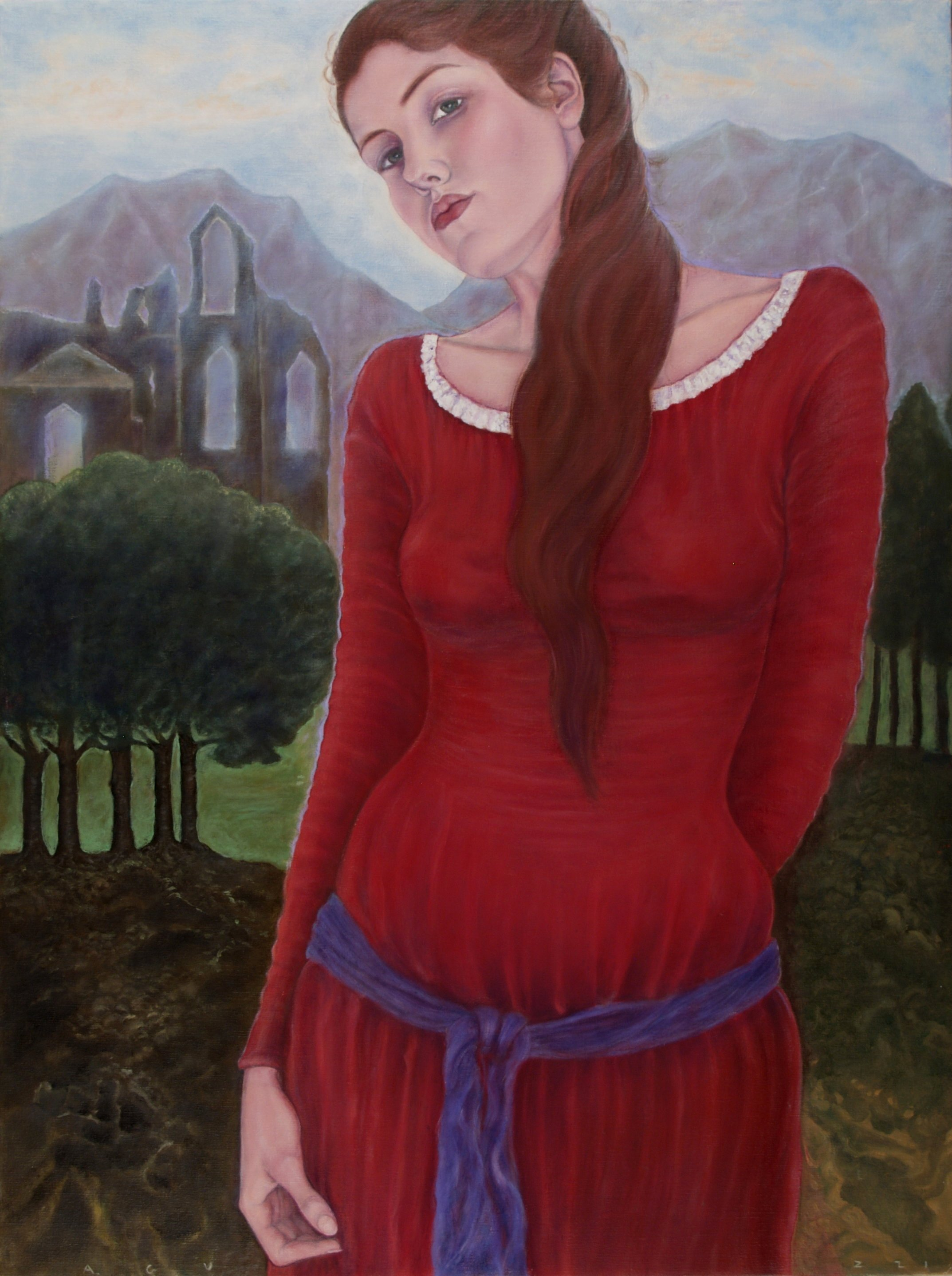 La regina dell'alba, olio su tela di lino, cm. 100x75